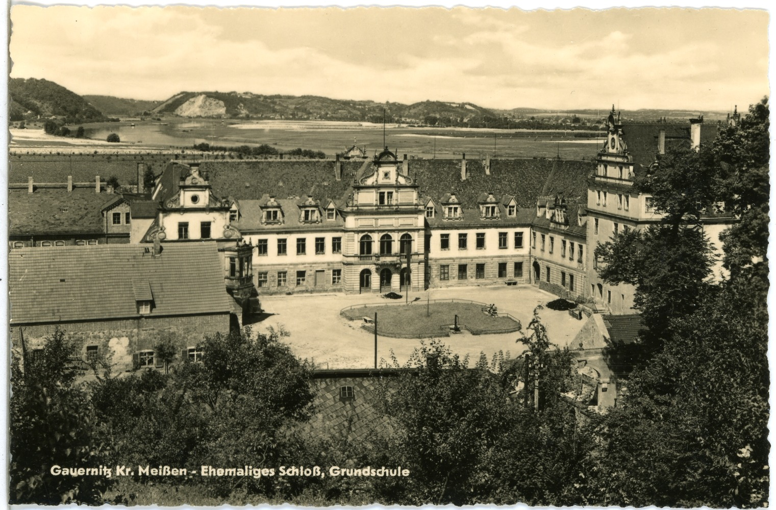 Gauernitz; Schloß This postcard is from publisher Brück & Sohn in Meißen ( postcard has a unique number 29002 and is available in a higher resolution at the publisher. This images was uploaded in a cooperation project between Wikipedians and the publisher.